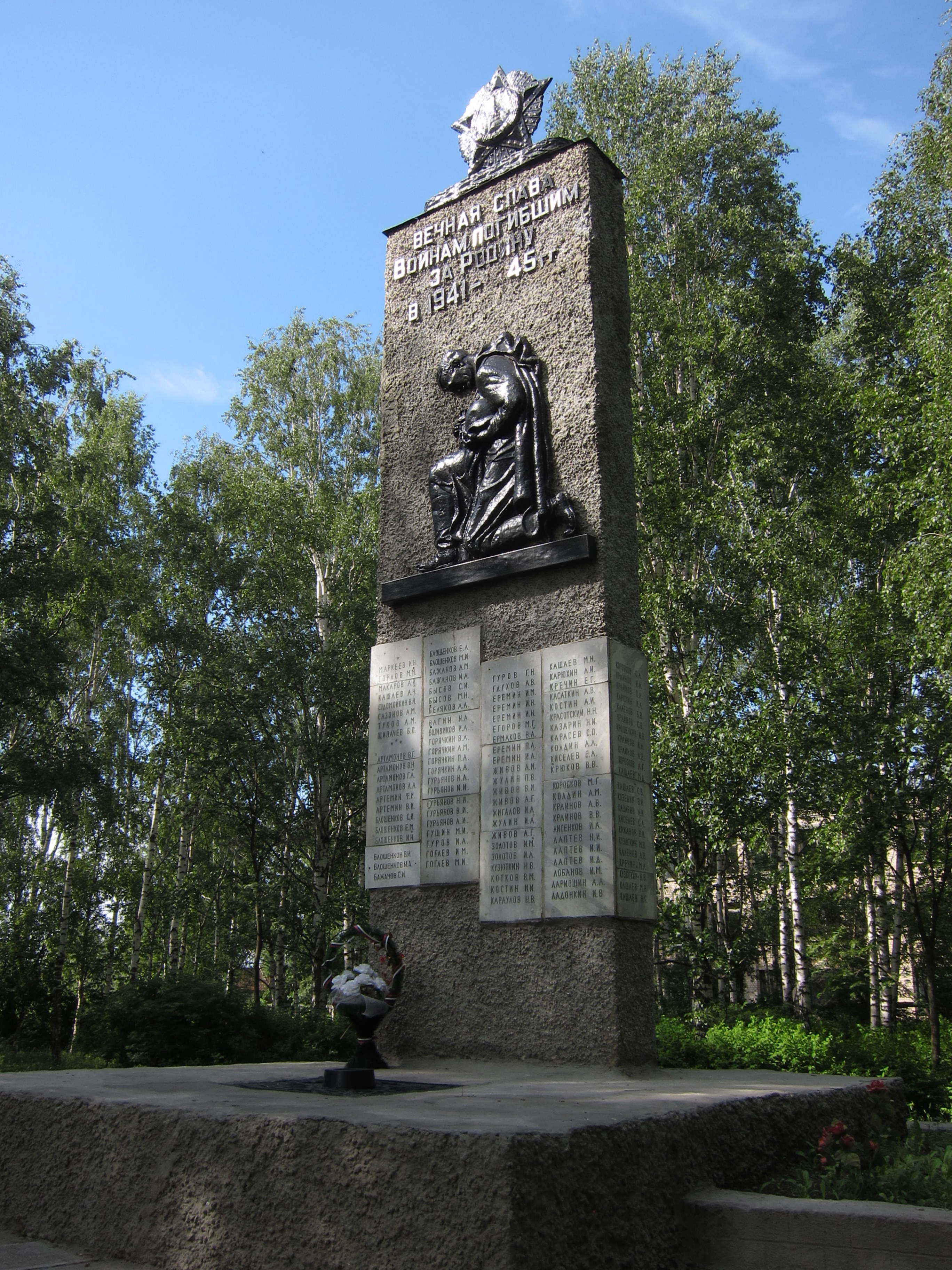 Красное Арзамасский район памятник